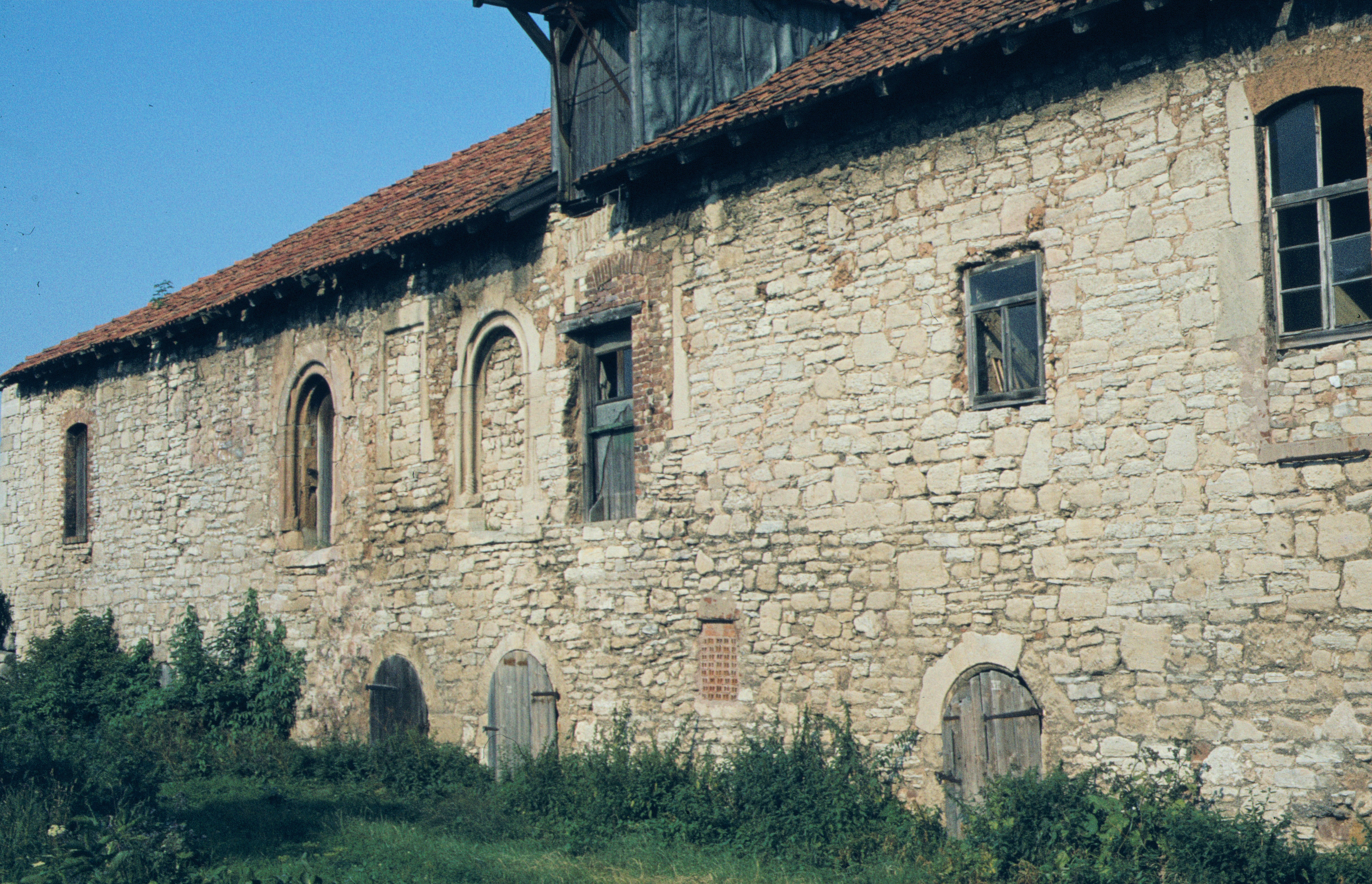 Westfassade des Herrenhauses